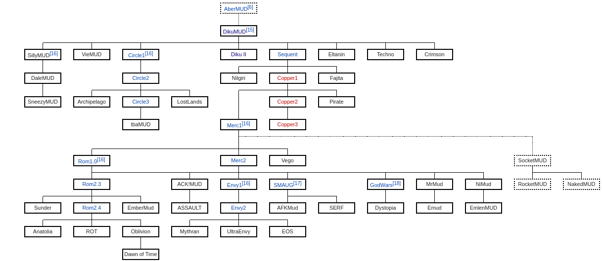 Billedgengivelse af wiki-markup fra